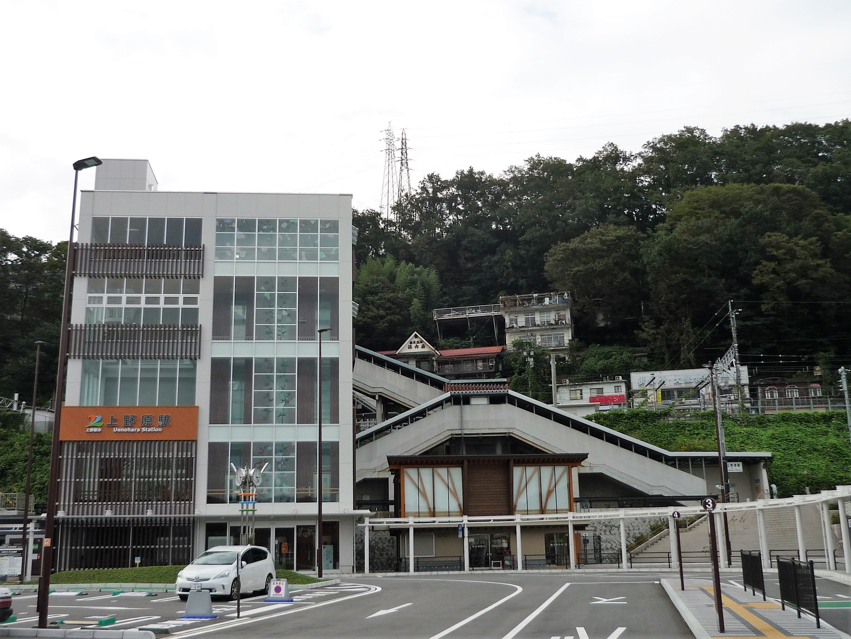 上野原駅南口（駅前広場完成後） Panasonic Lumix DMC-FS3